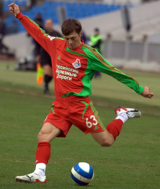 Diniyar Bilyaletdinov